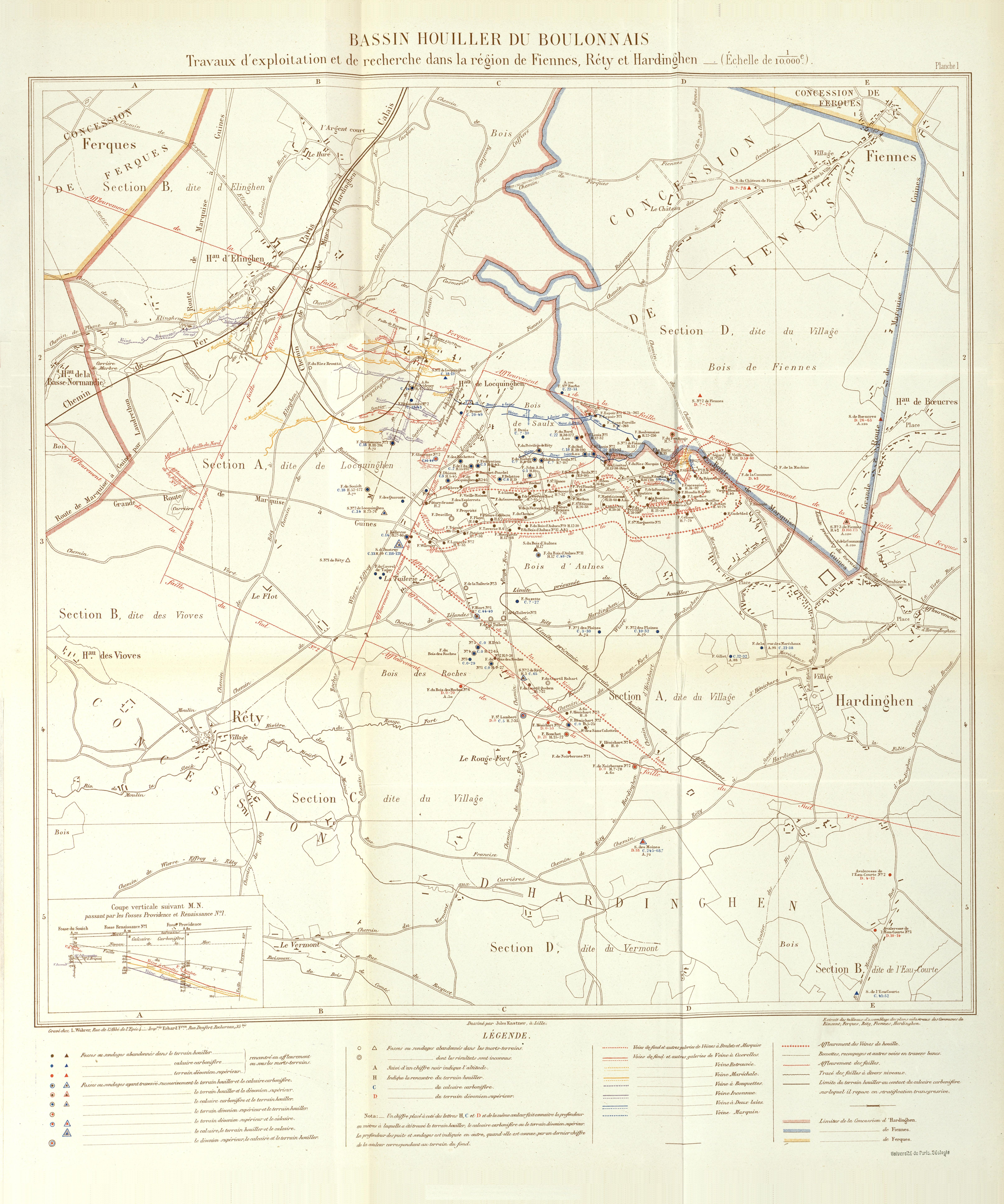 Carte très détaillée, permettant la localisation des puits des Mines du Boulonnais.